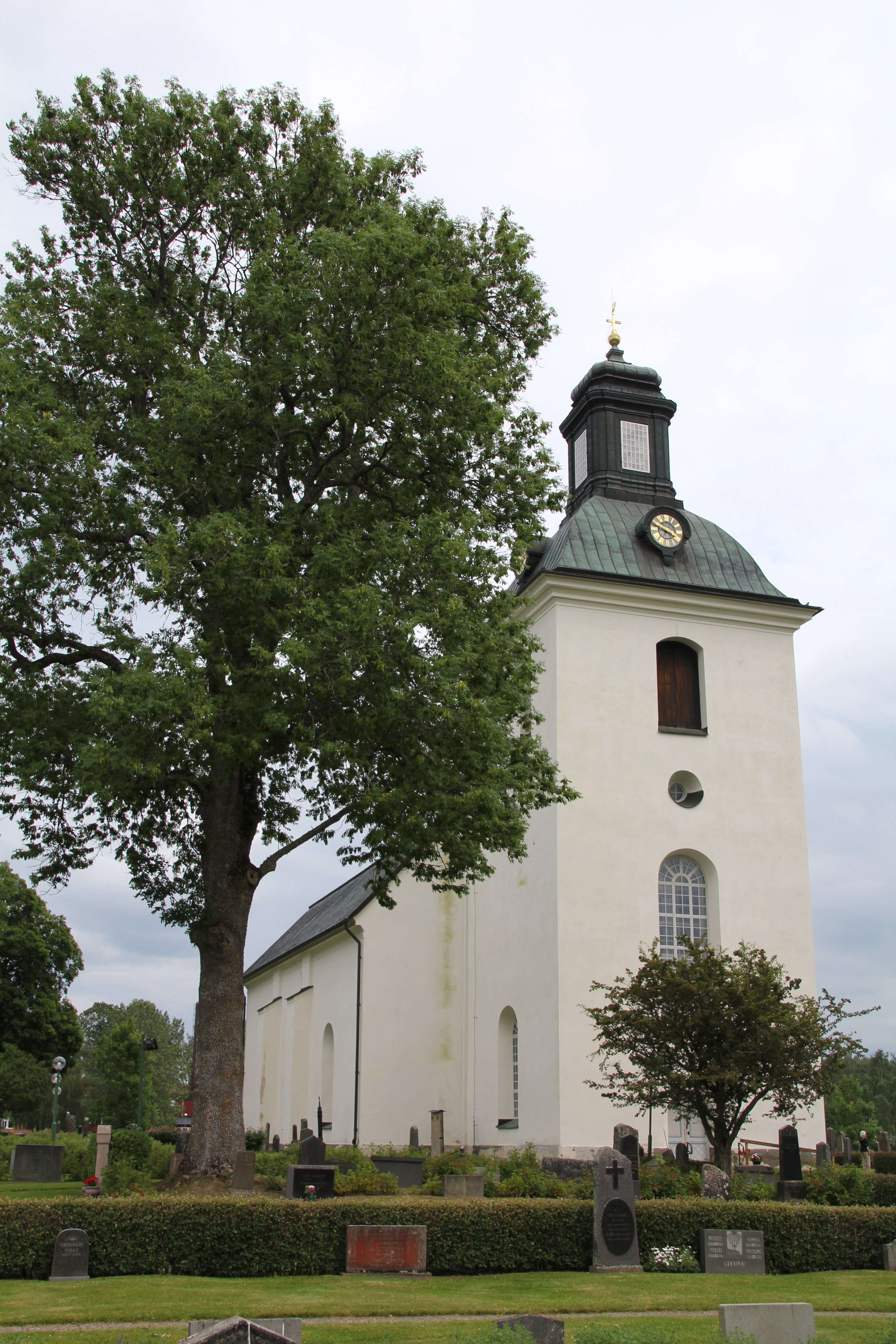 Nora kyrka i Heby kommun.